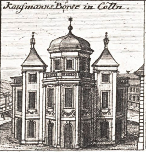 Ansicht der Berliner Börse 1757